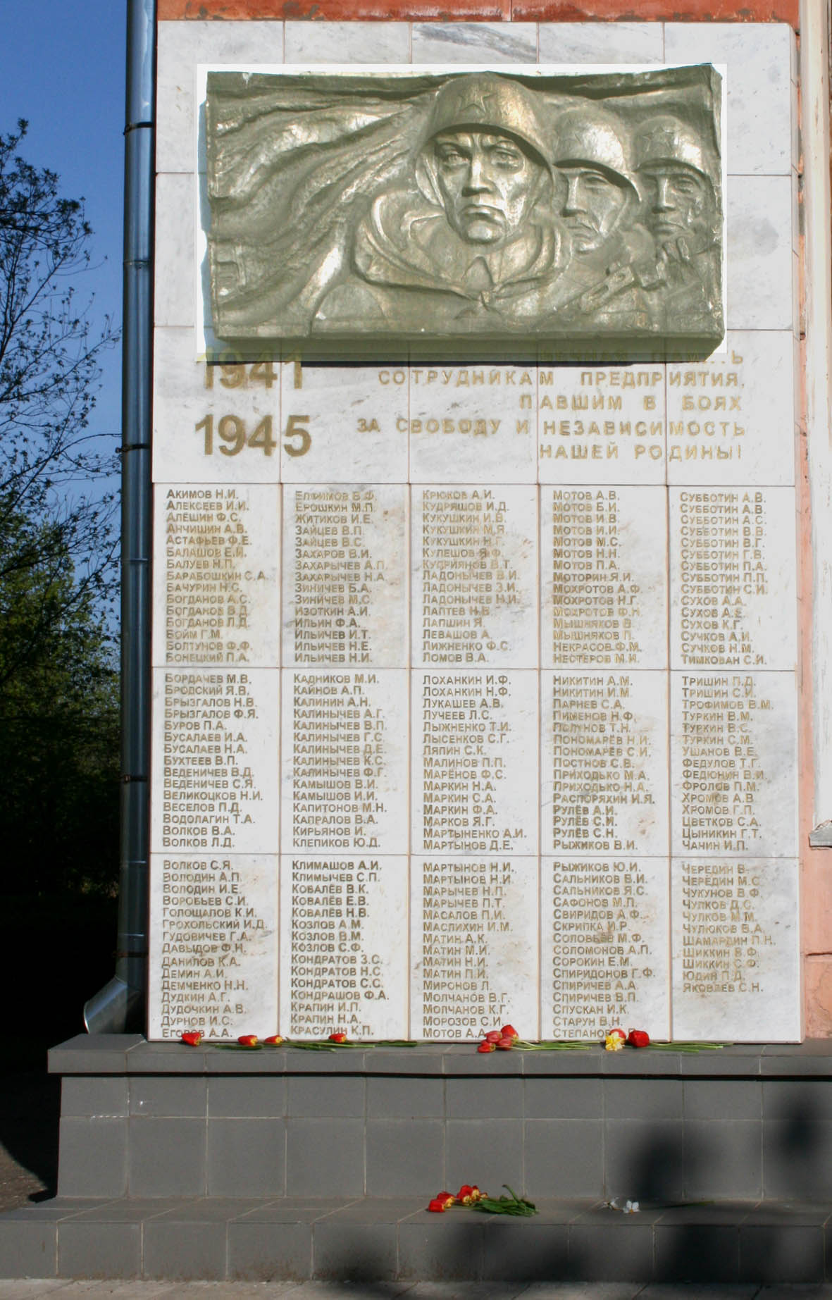 Барельеф на стене Памяти